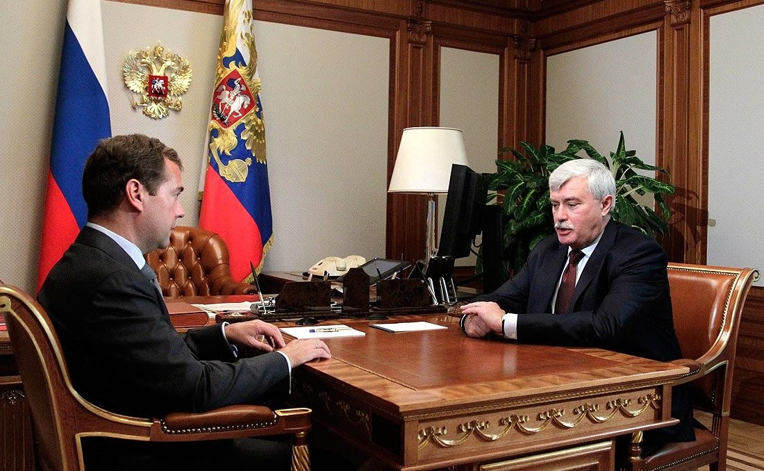 30 августа 2011 года. Президент Российской Федерации Д. А. Медведев и полномочный представитель Президента Российской Федерации в Центральном федеральном округе Г. С. Полтавченко